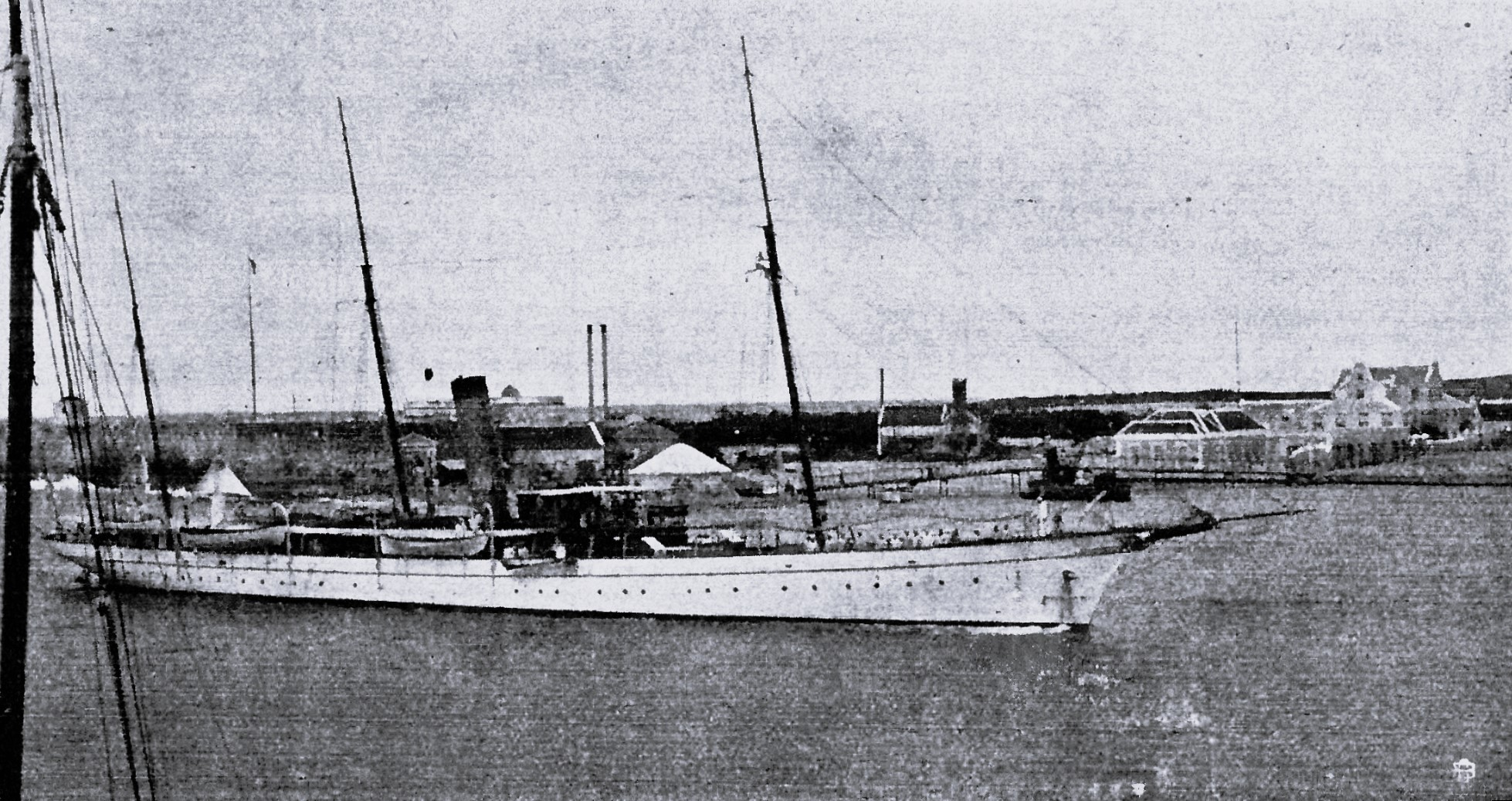 „Restaurador“ läuft unter deutscher Flagge in Curaçao ein.